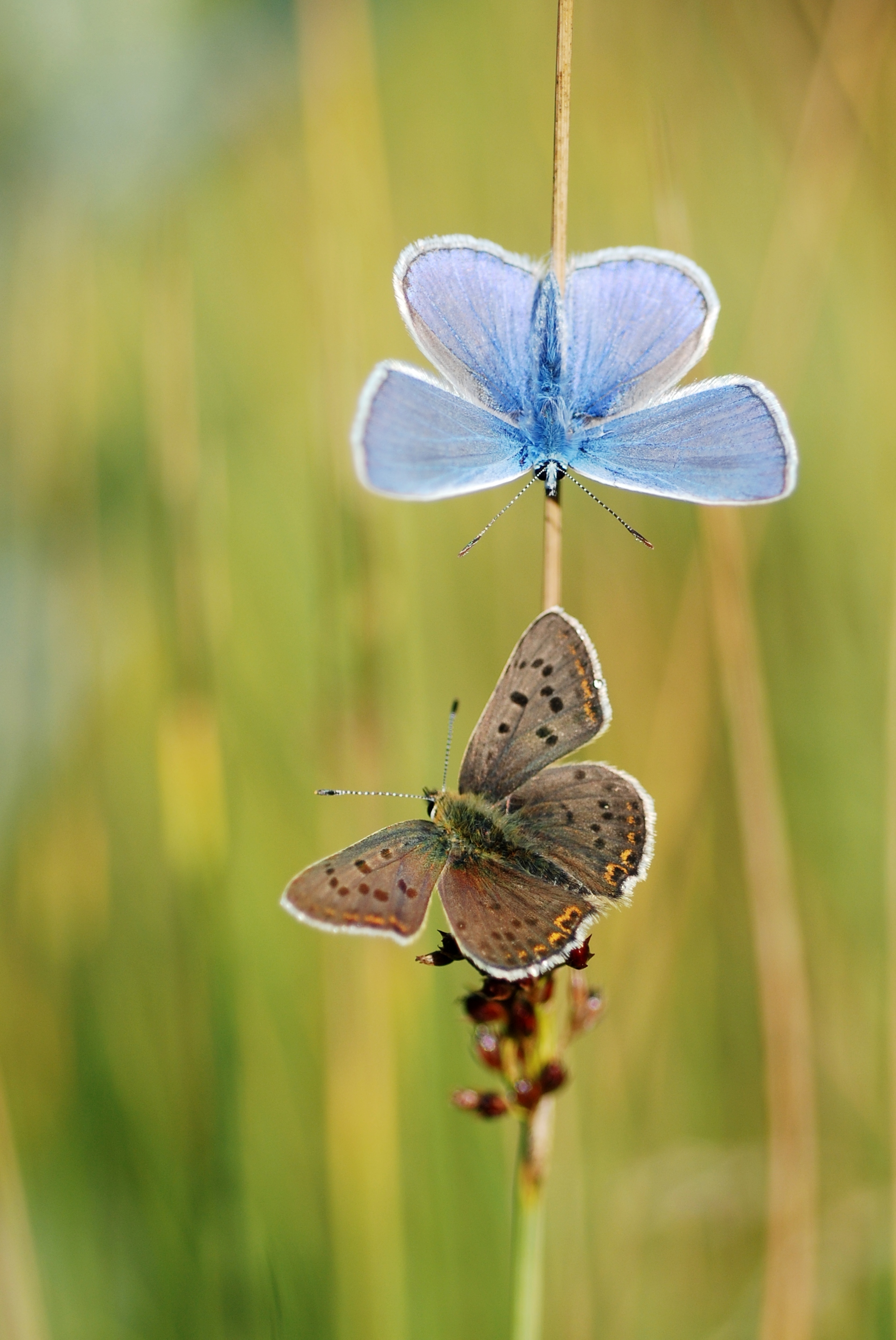 Polyommatus icarus & Lycaena tityrus basking